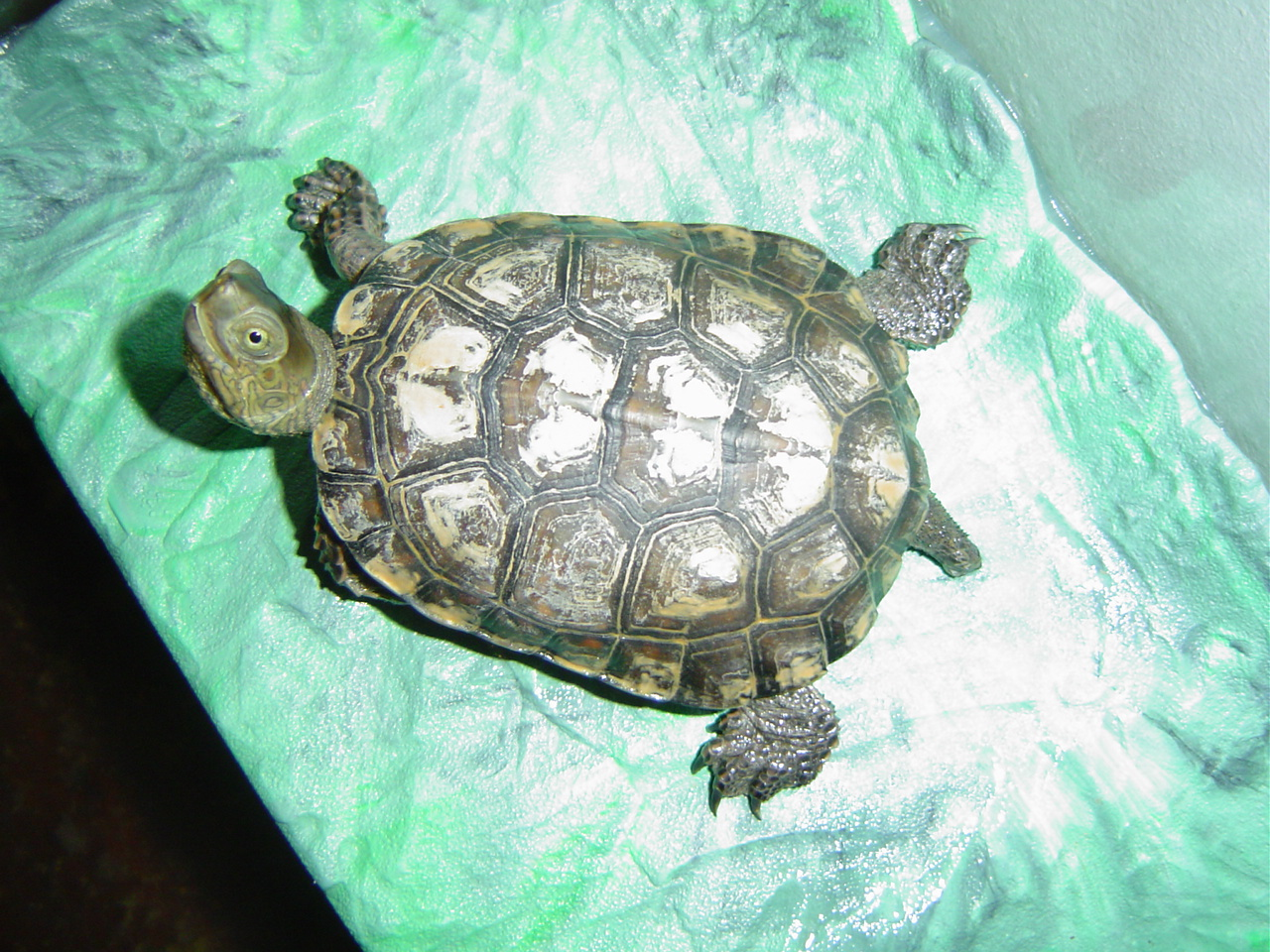 Mauremys leprosa (Galápago leproso). Córdoba, Spain